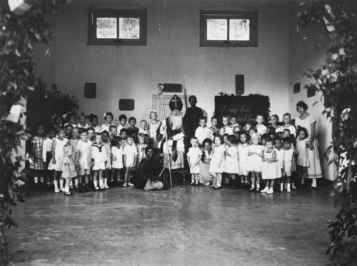 Foto. Sinterklaas en twee Zwarte Pieten temidden van een groep kinderen ter gelegenheid van het Sinterklaasfeest